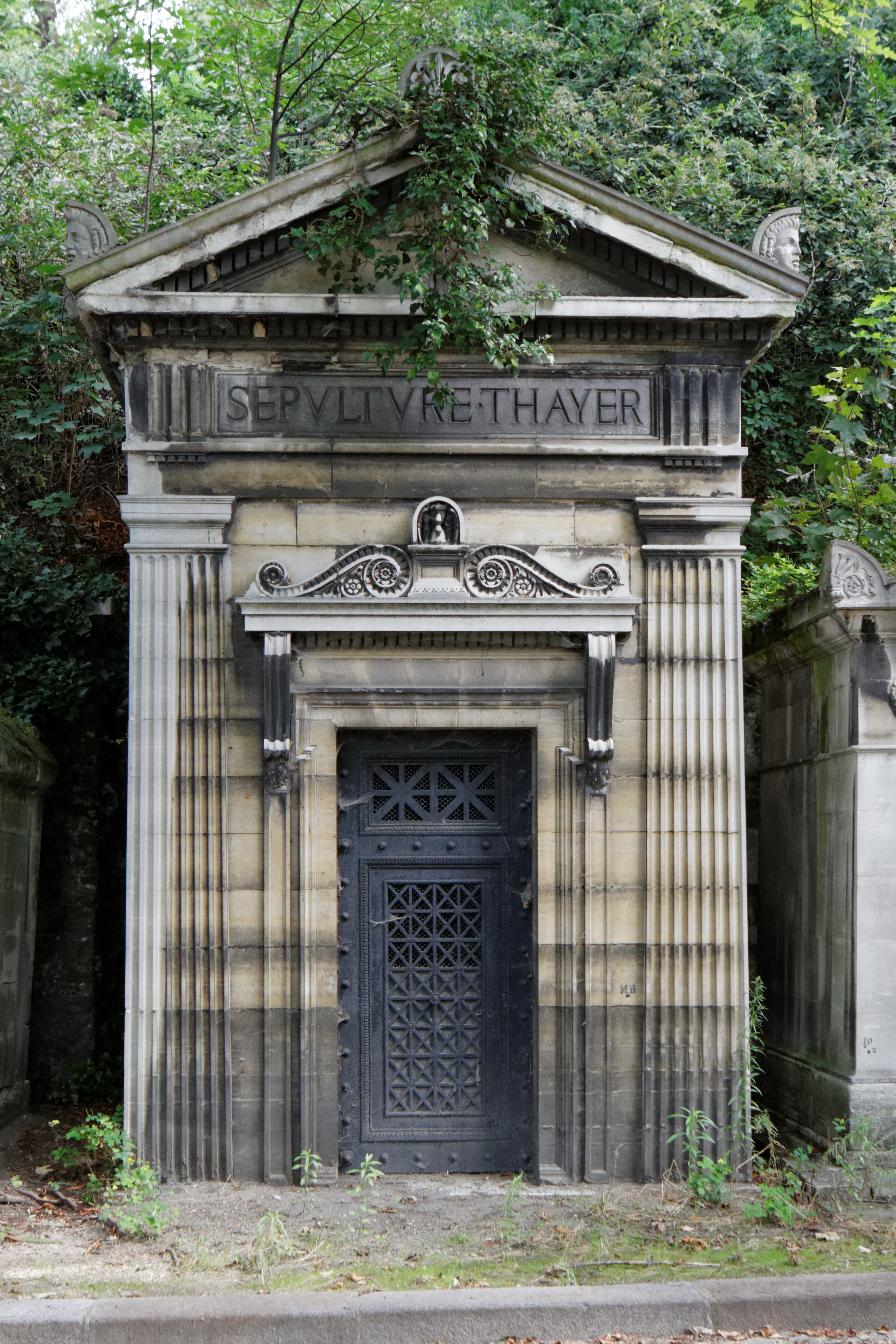 Chapelle du sénateur Édouard-James Thayer (1802-1859).